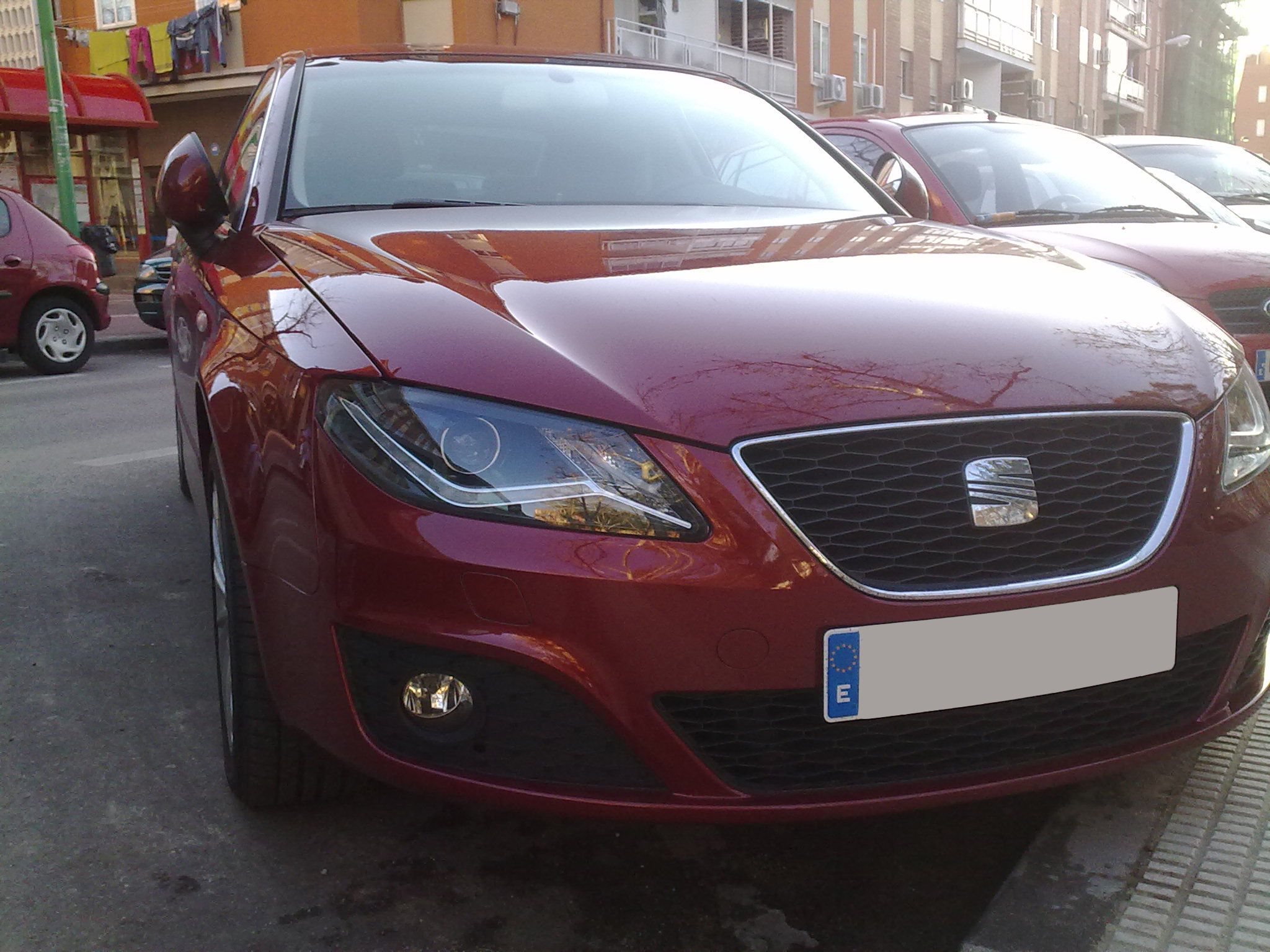 Exeo con nuevo frontal (faros de led con parrilla de nido de abeja)